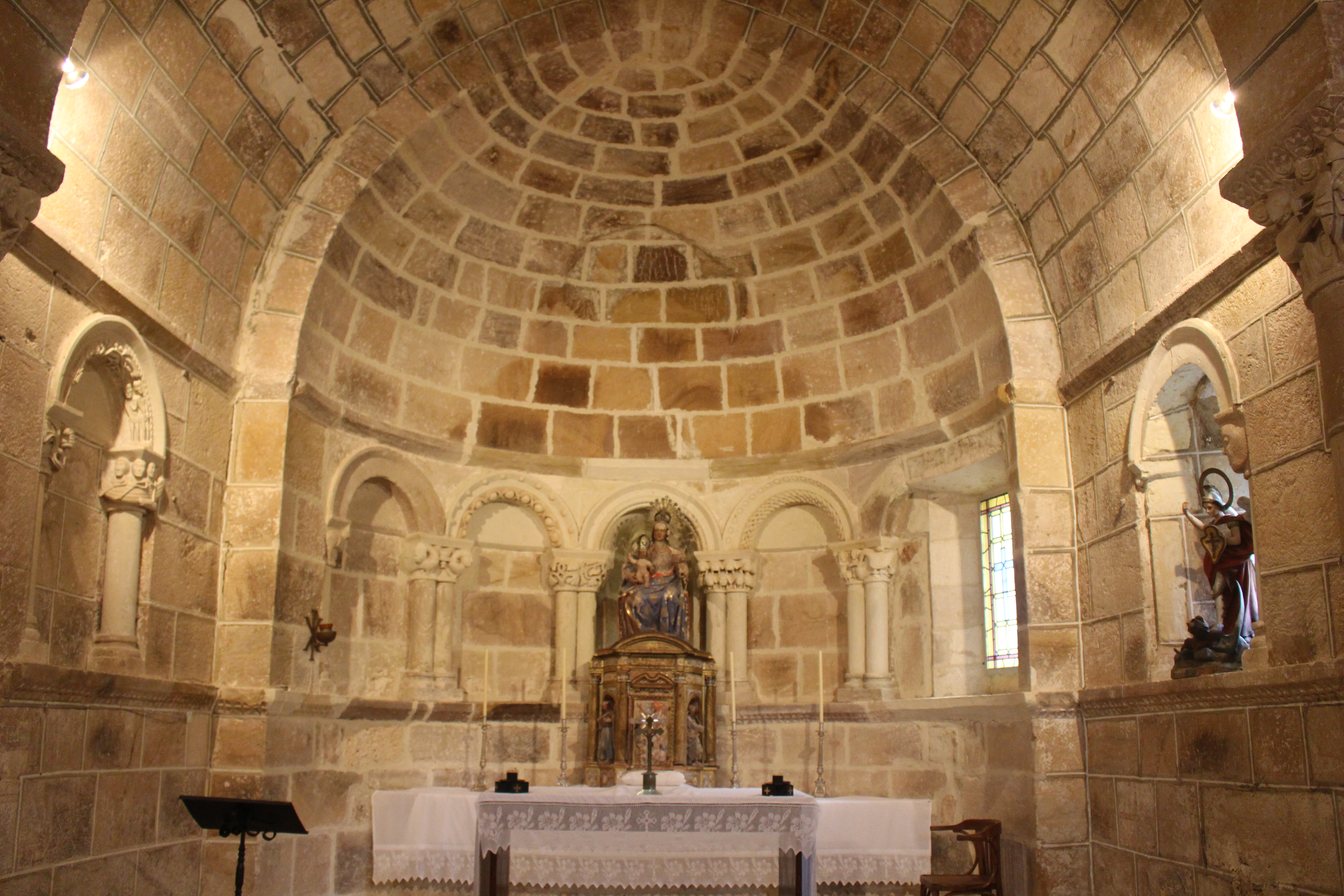 Imágenes que hablan de la presencia del cristianismo celta irlandés en la Castilla del siglo XII.